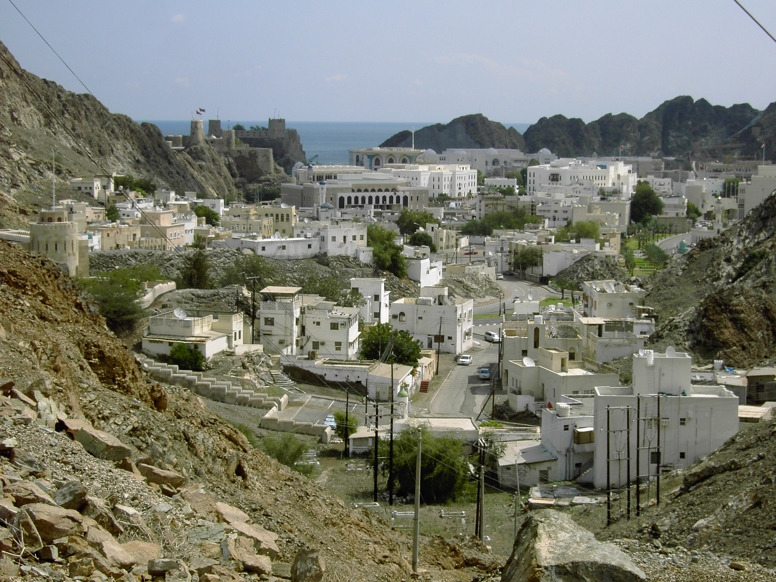 Der ursprüngliche Kern von Maskat ist recht überschaubar, beherbergt aber wichtige Ämter und den futuristischen Sultanspalast.